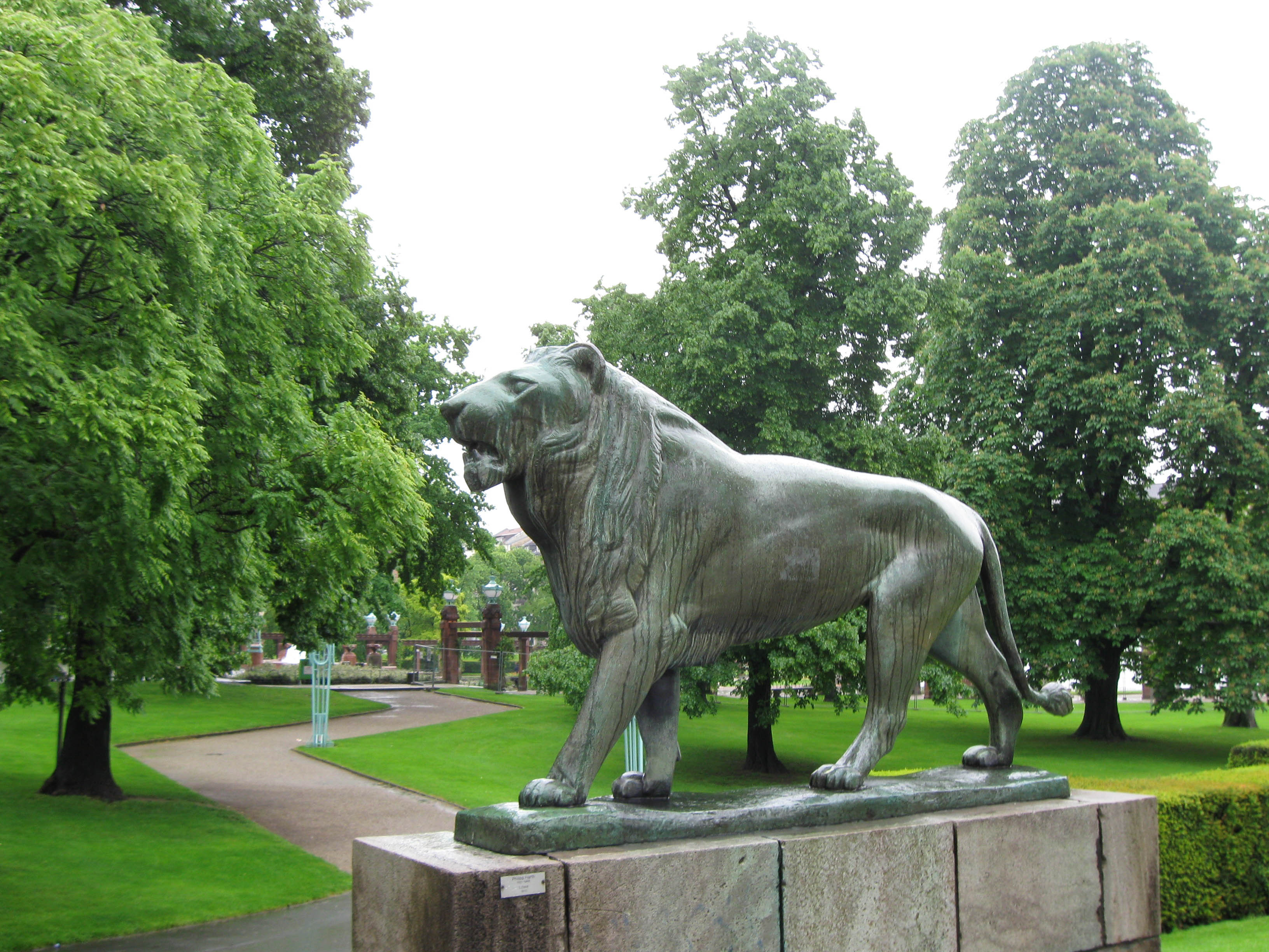 Löwe Mannheimer Kunsthalle